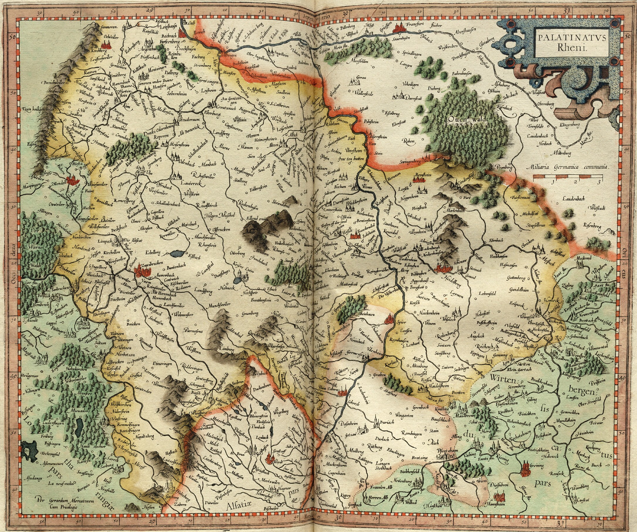 Map of Rheinpfalz; 33,5 x 41,5 cm